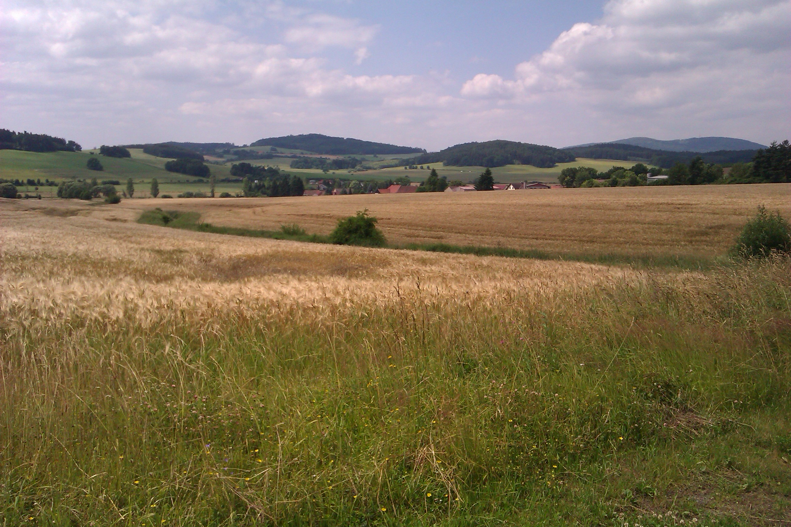 pohled na Vícenice ze severovýchodní strany